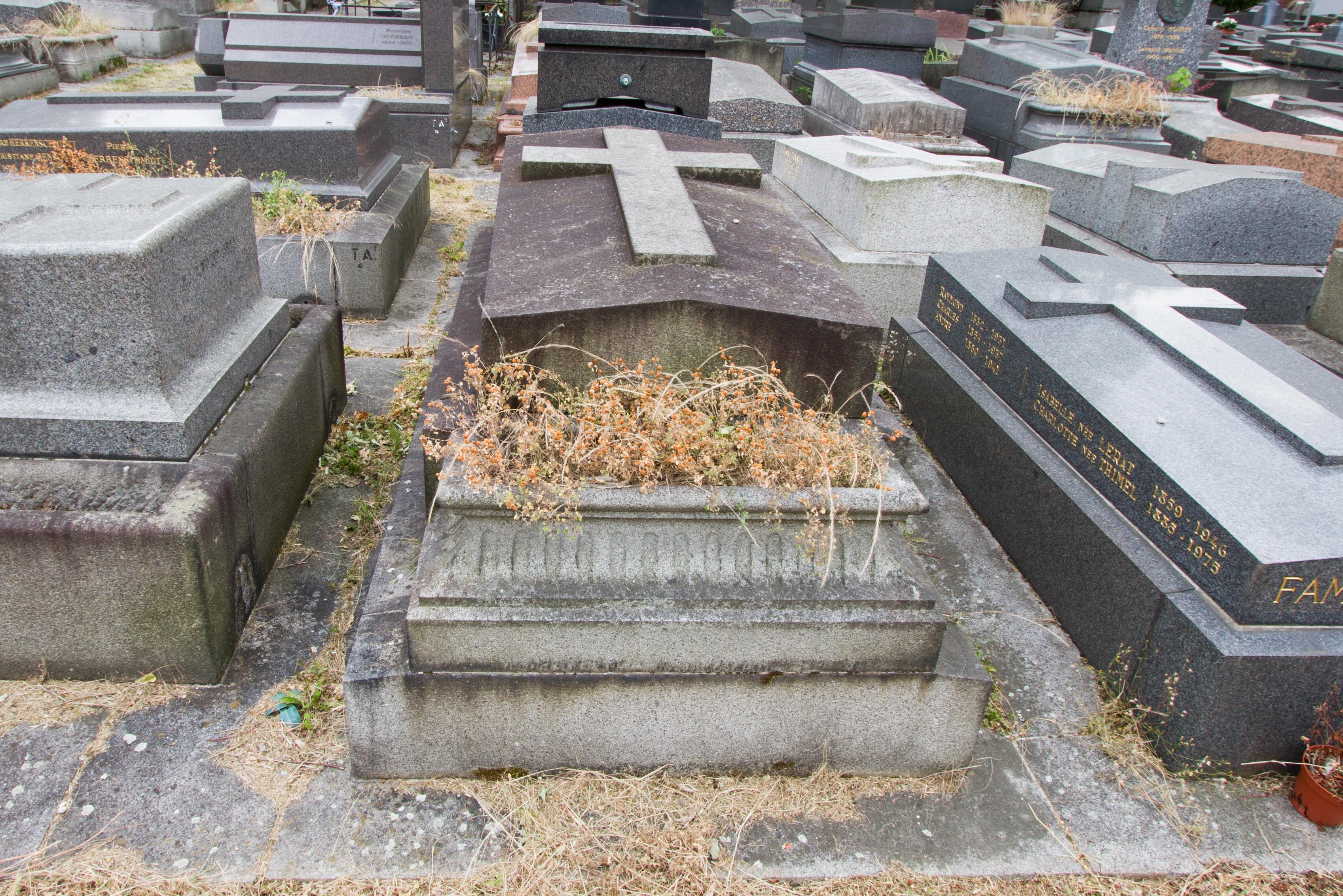 Sépulture de Bojidar Karageorgevitch (1862-1908), prince, journaliste et artiste serbe ; Sarka Anastasijević, épouse de George Karageorgevich, mère de Bojidar Karageorgevitch. Simple pierre en granit ne portant aucune inscription.